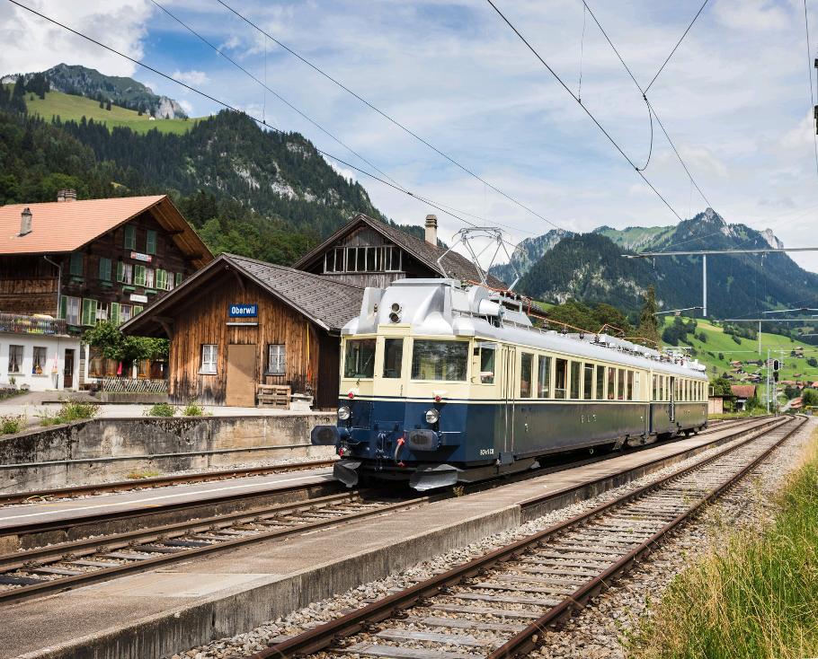 Blauer Pfeil in Oberwil im Simmental